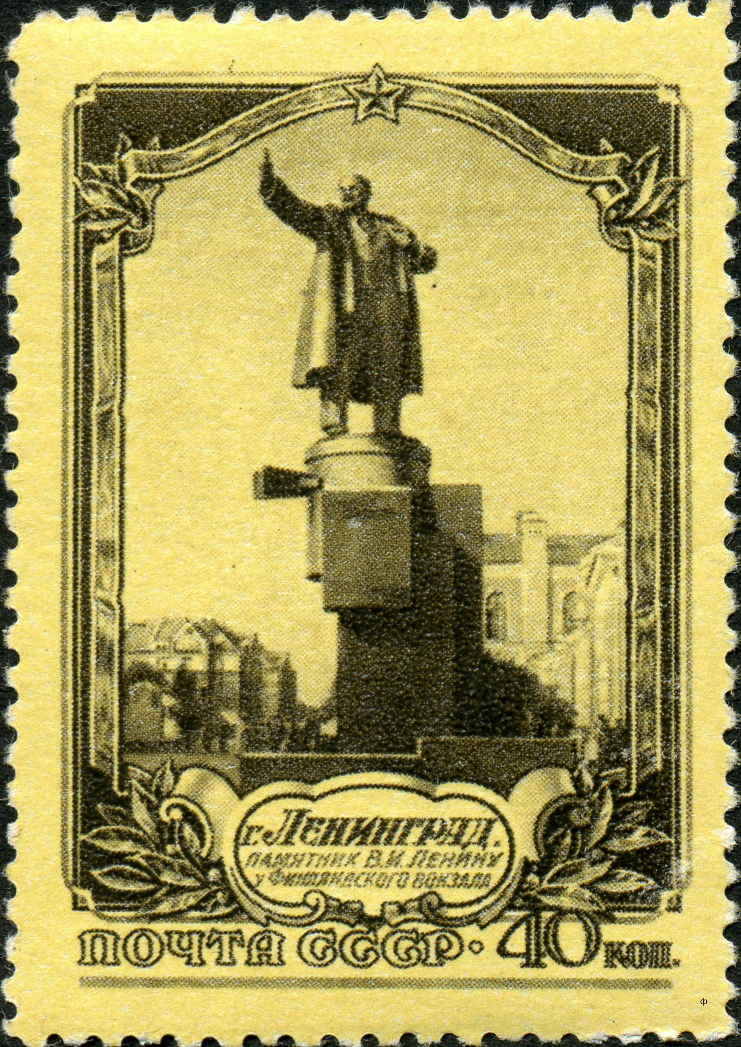 Марка СССР, памятник Ленину на броневике